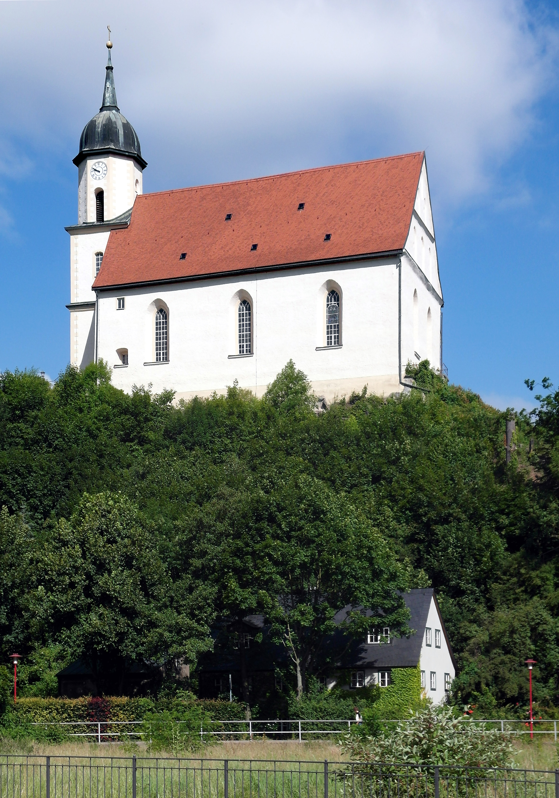 24.06.2014 01737 Tharandt: Bergkirche zum Heiligen Kreuz. [SAM4785.JPG]20140624070DR.JPG(c)Blobelt